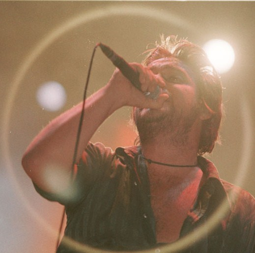 Vicentico en un concierto